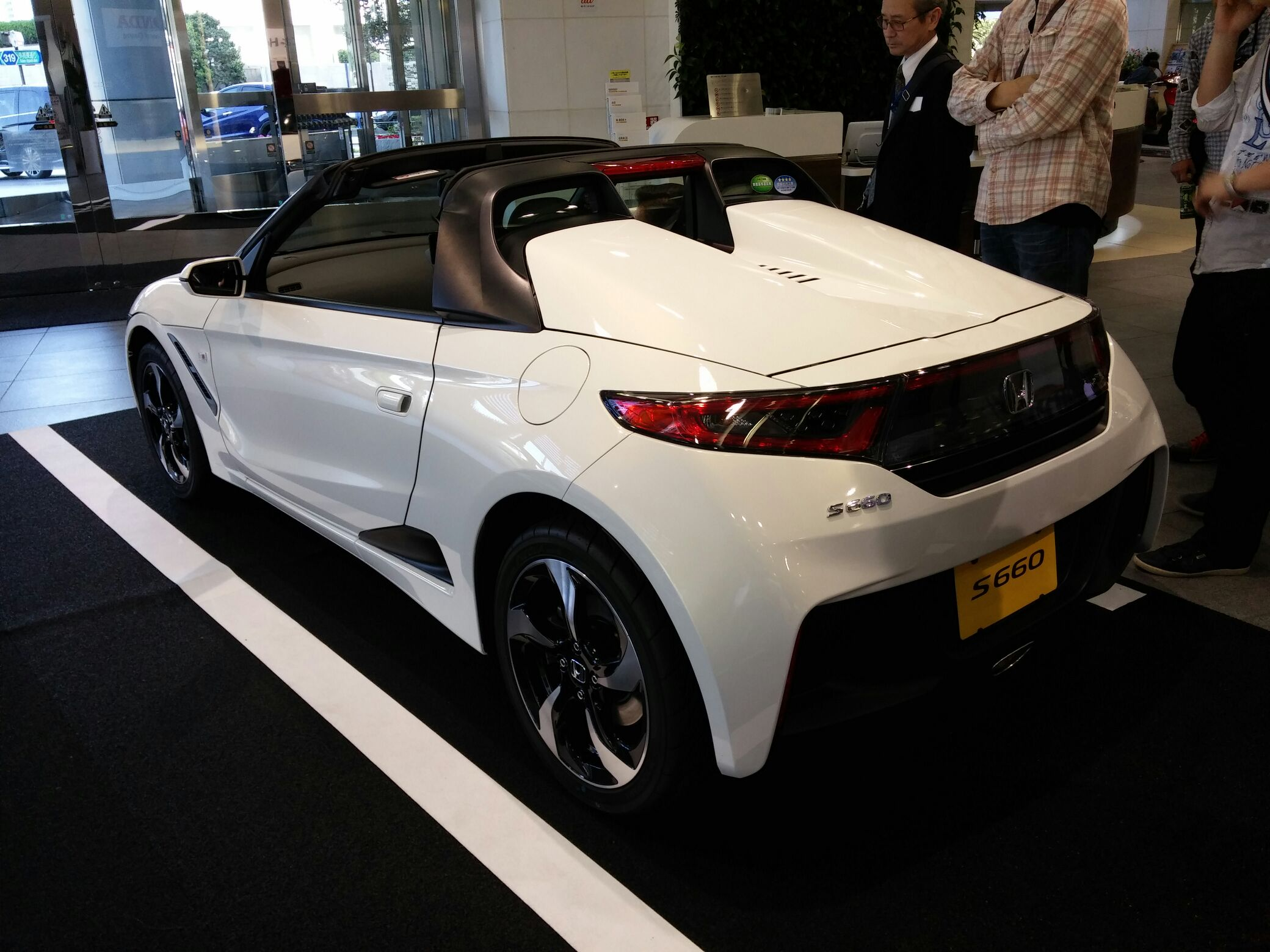 ホンダ・S660